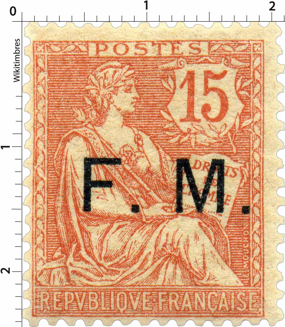 Franchise militaire type Mouchon retouché